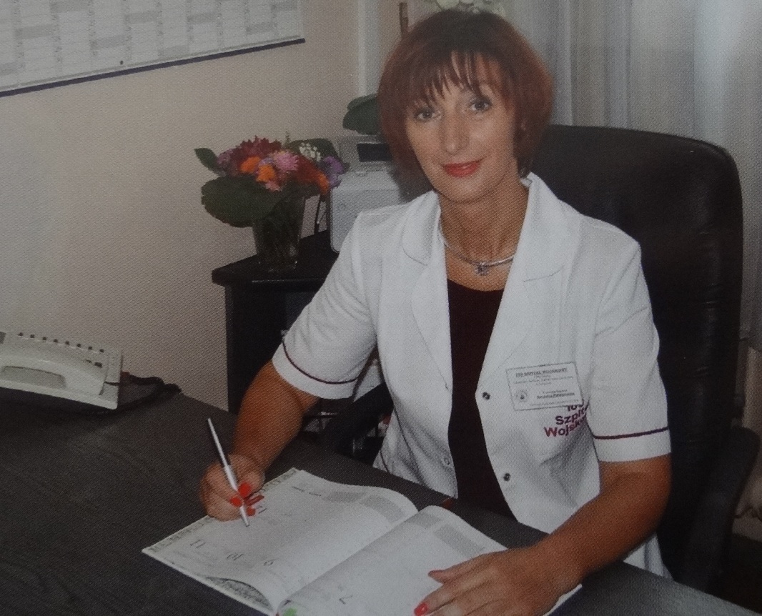 Naczelna 109 Szpitala Wojskowego mgr Katarzyna Grabowiecka